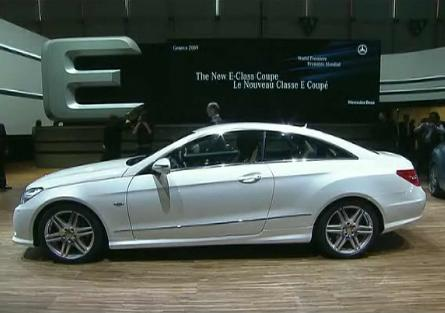 Mercedes Classe E Coupé au Salon de Genève 2009